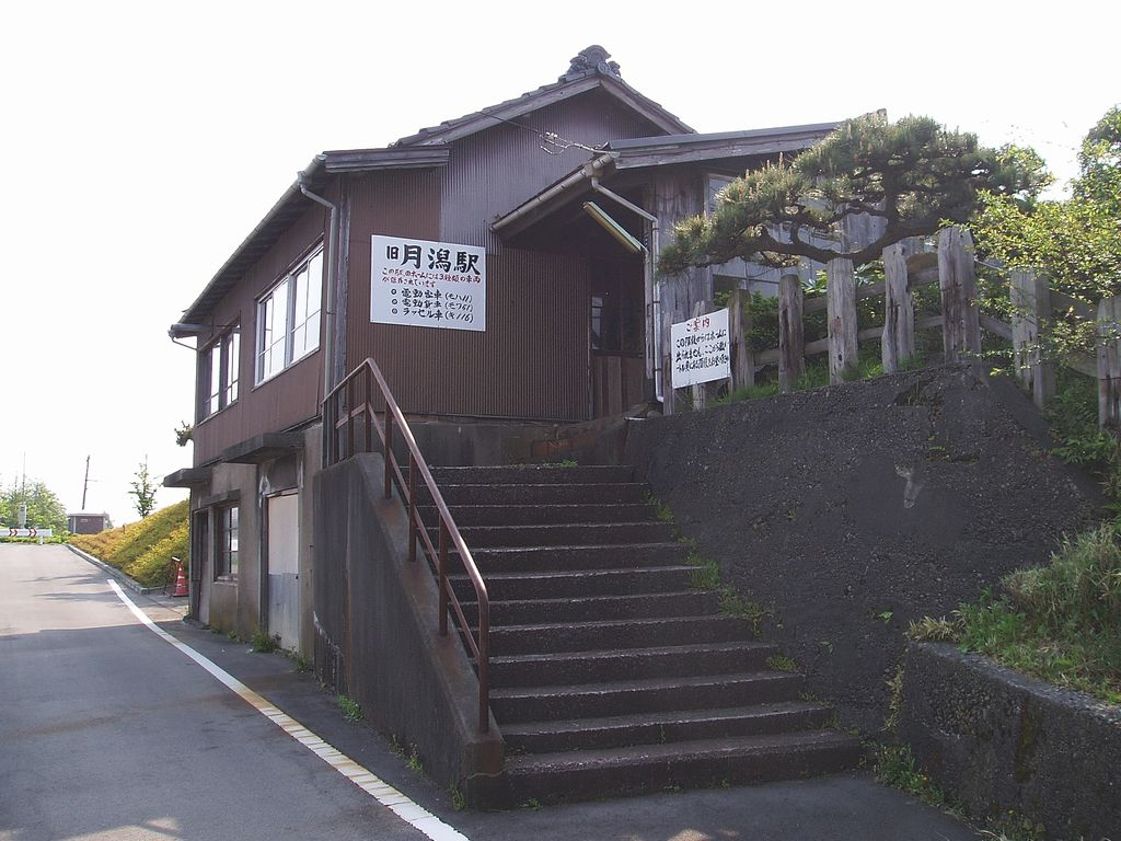 月潟駅駅舎